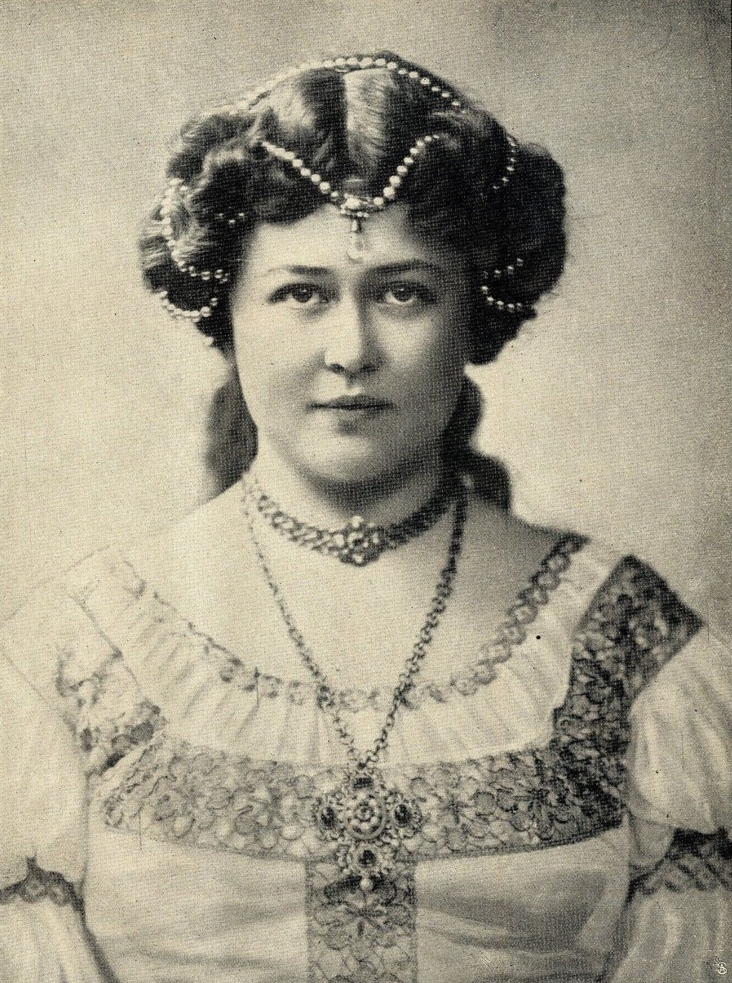 Lilly Hafgren-Waag] als 'Eva' in Wagners 'Meistersinger', 1912